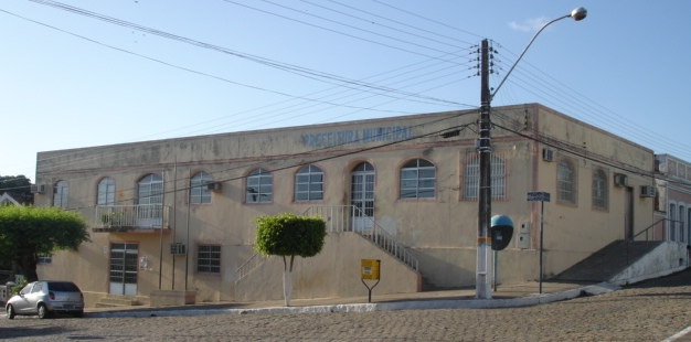 Preitura Municipal de Traipu, localizada em frente a Igreja de Nossa Senhora do Ó.